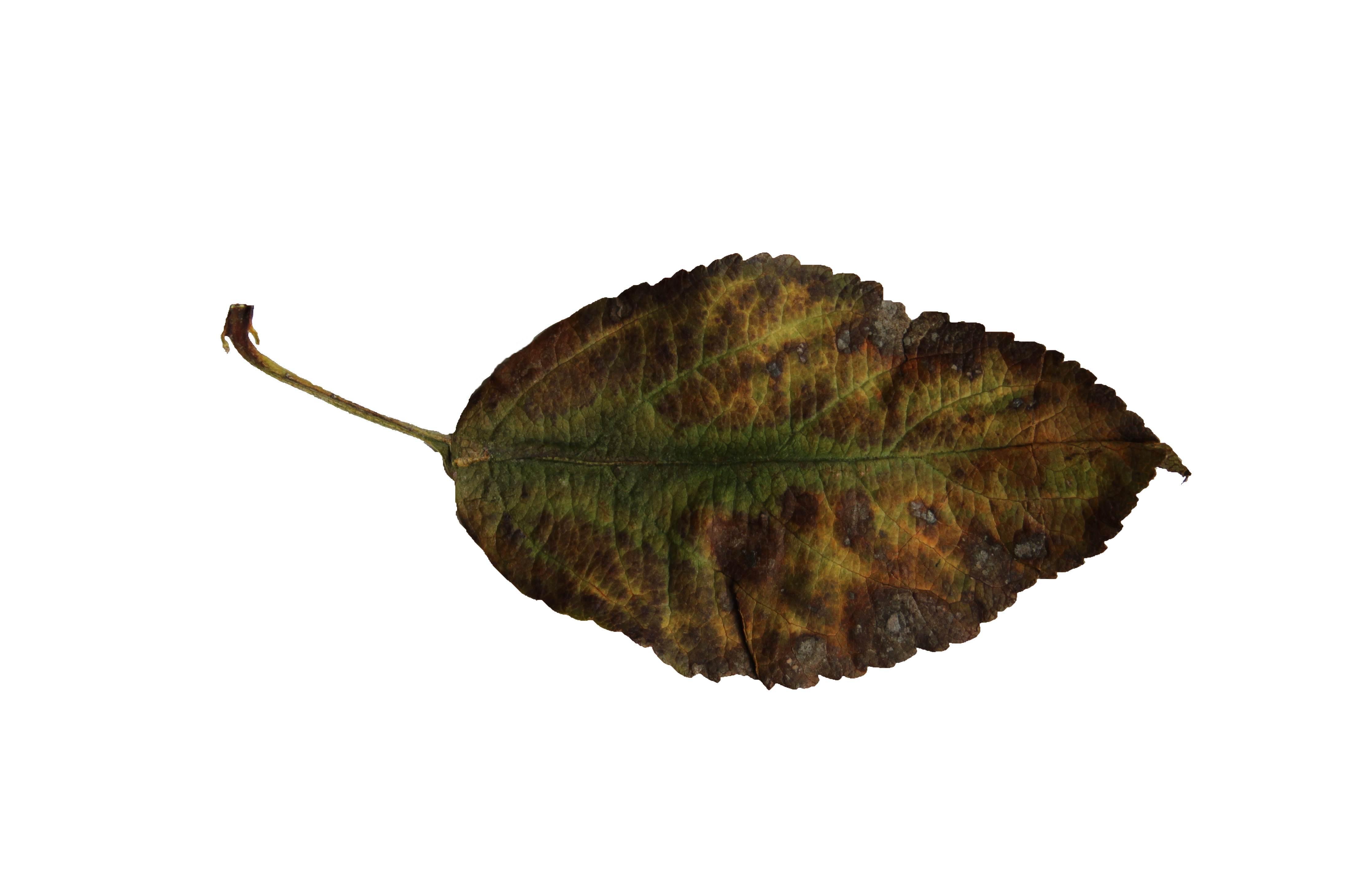 Blatt der Sorte Kanzi mit Spurenelementmangel